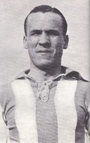 Foto de Bienzobas, jugador de la Real Sociedad en los años 20 y 30.